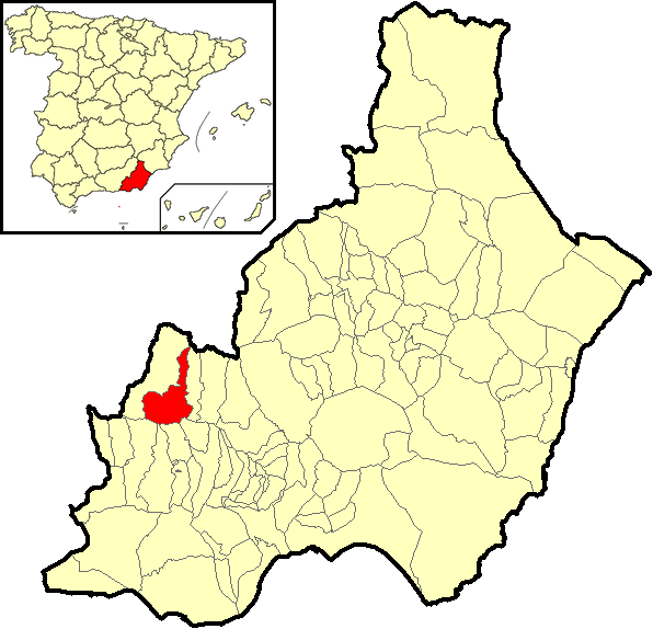 Situación del término municipal de Abrucena respecto a la provincia de Almería, en España.